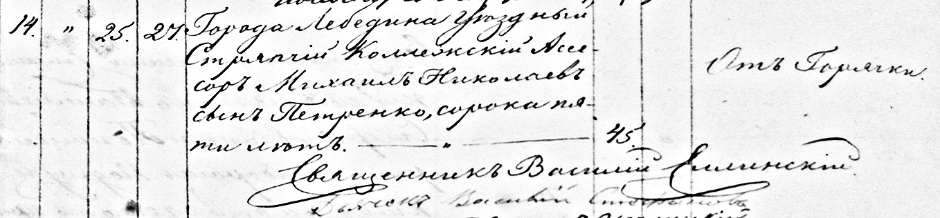 про смерть Михайла Петренка з метрики Миколаївської церкви Лебедина